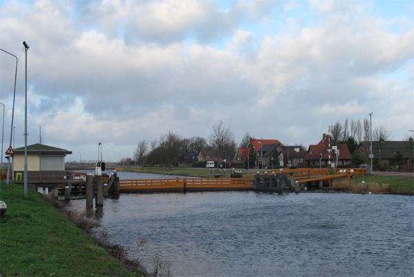 eigen werk categorie:Afbeelding brug